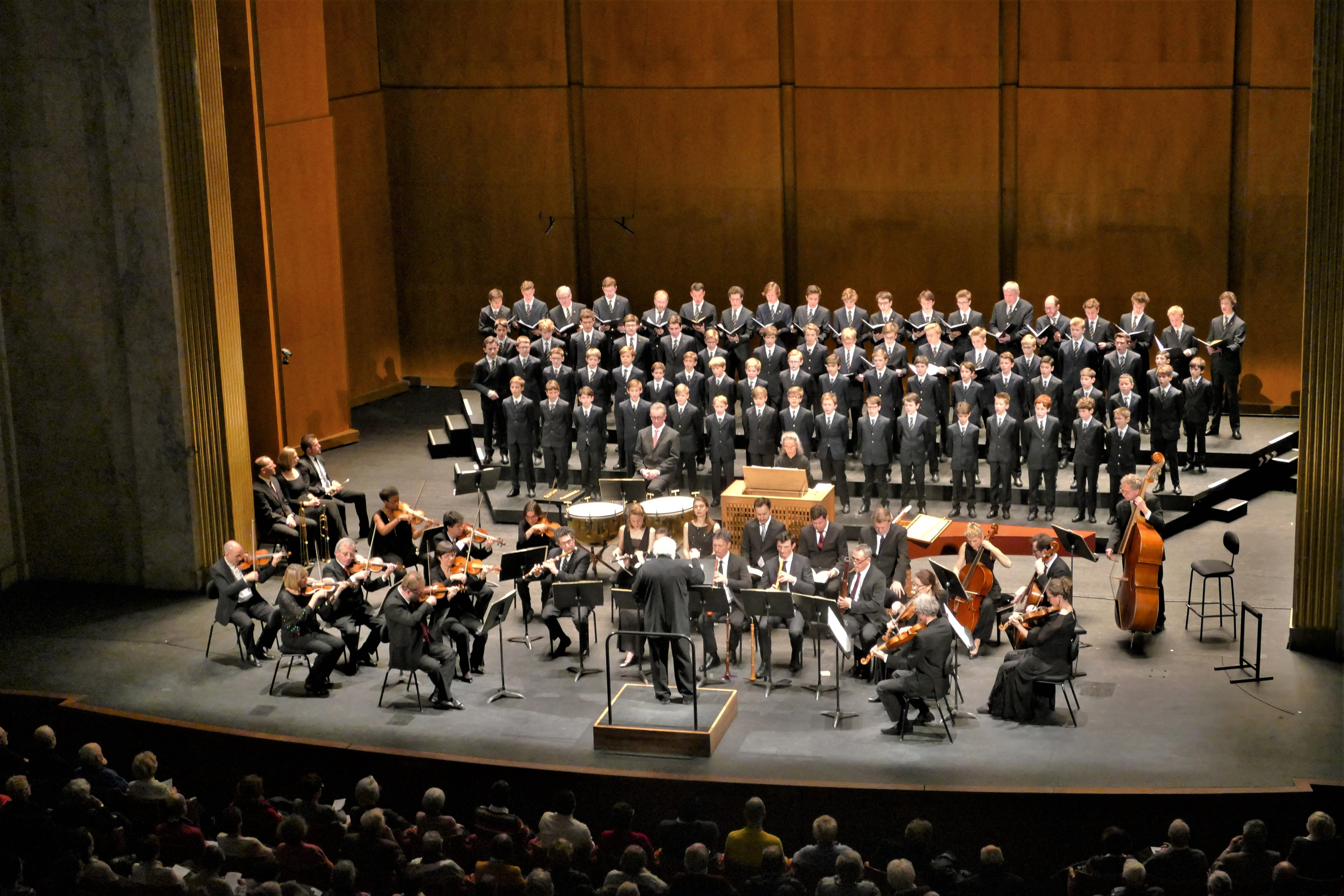 La Grande Écurie et la Chambre du Roy et les Petits Chanteurs de Sainte-Croix de Neuilly - The Paris Boys Choir. Julien Hanck